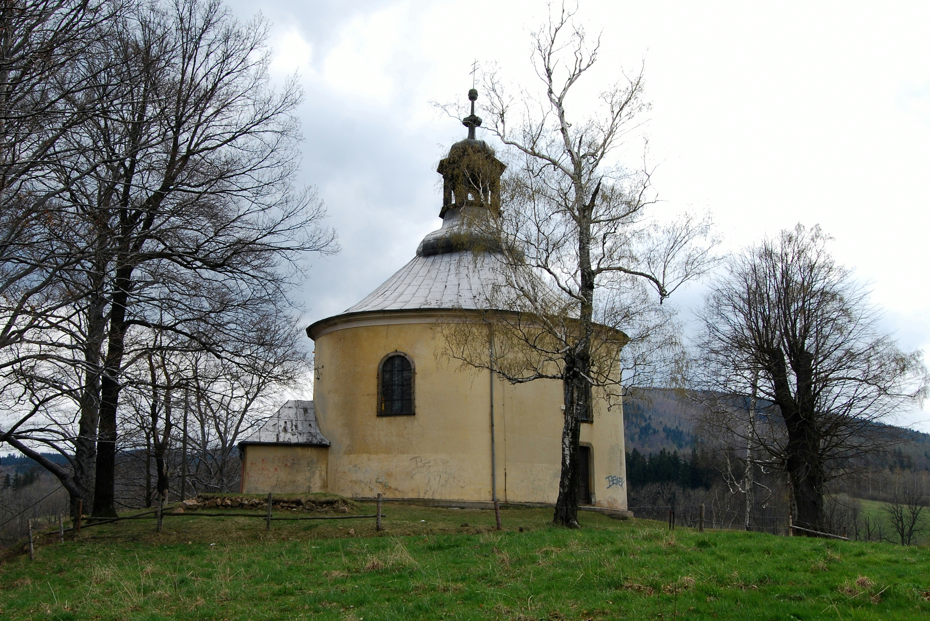 Kaplica św. Anny w Kowarach